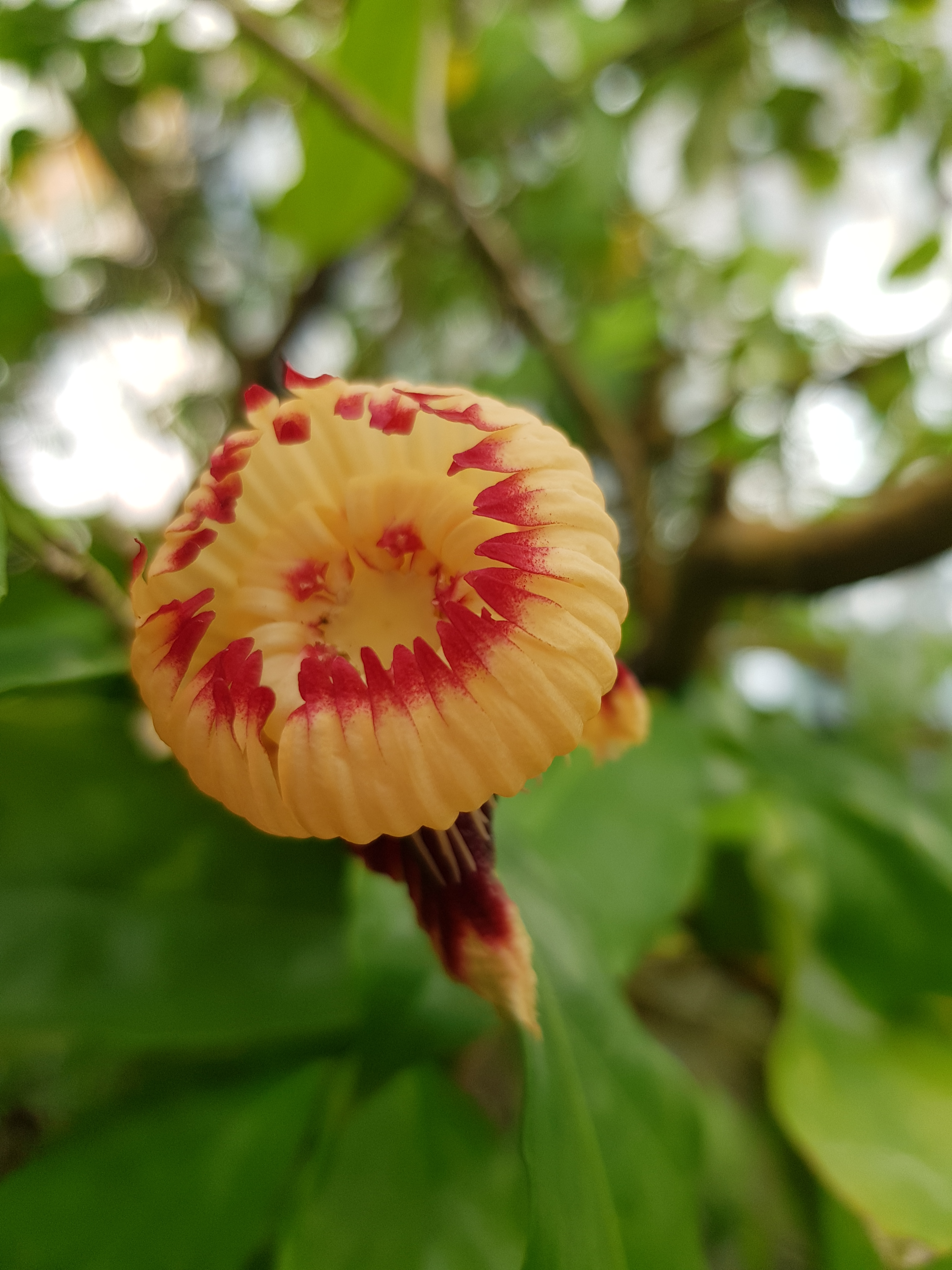 Napoleonaea vogelii.